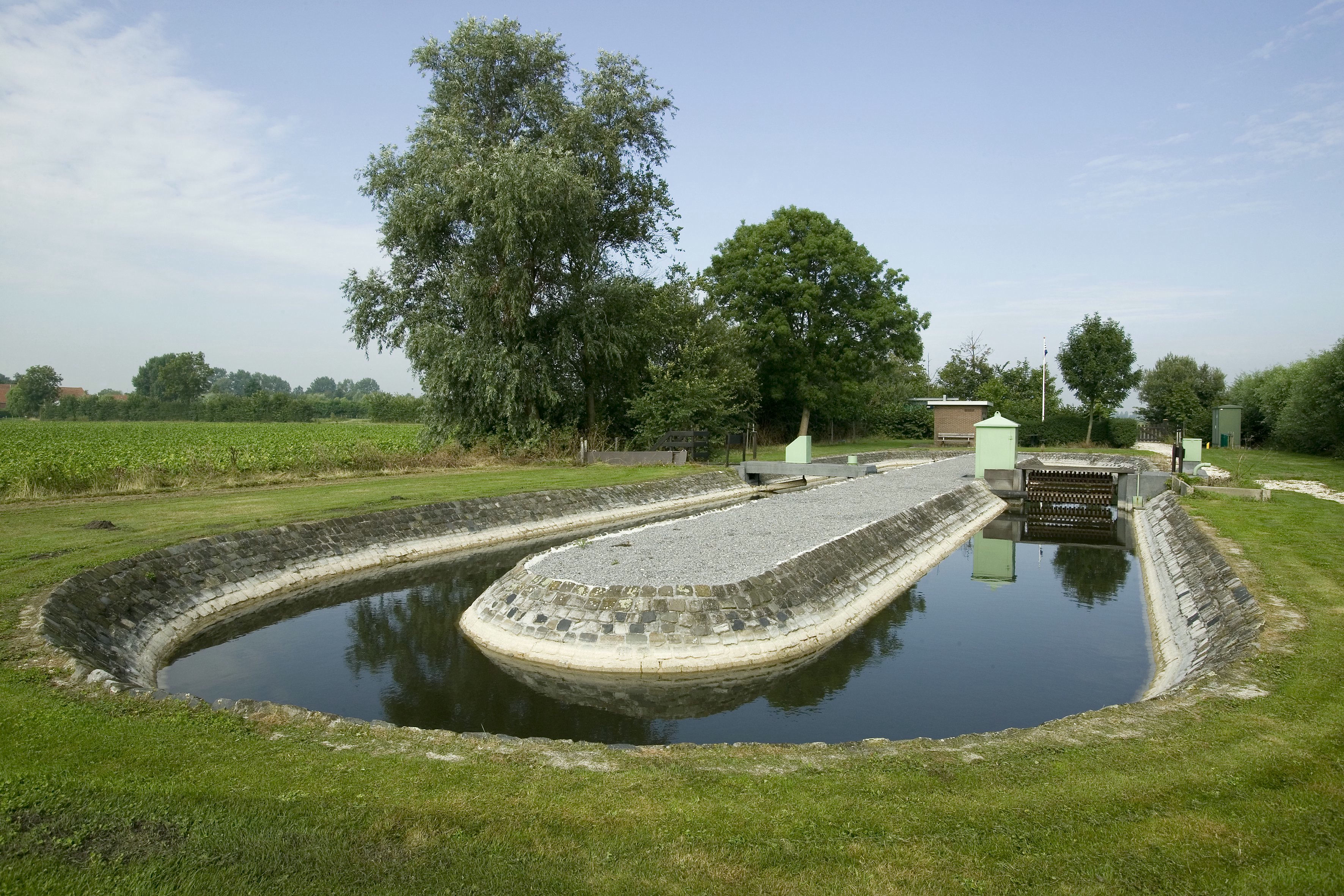 De Pasveersloot: Overzicht van de voormalige ovale oxidatiesloot/rioolwaterzuiveringsinstallatie met rotor, op de achtergrond een bedieningsgebouwtje